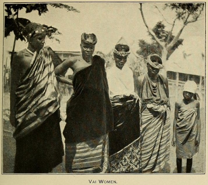 Vai Woman